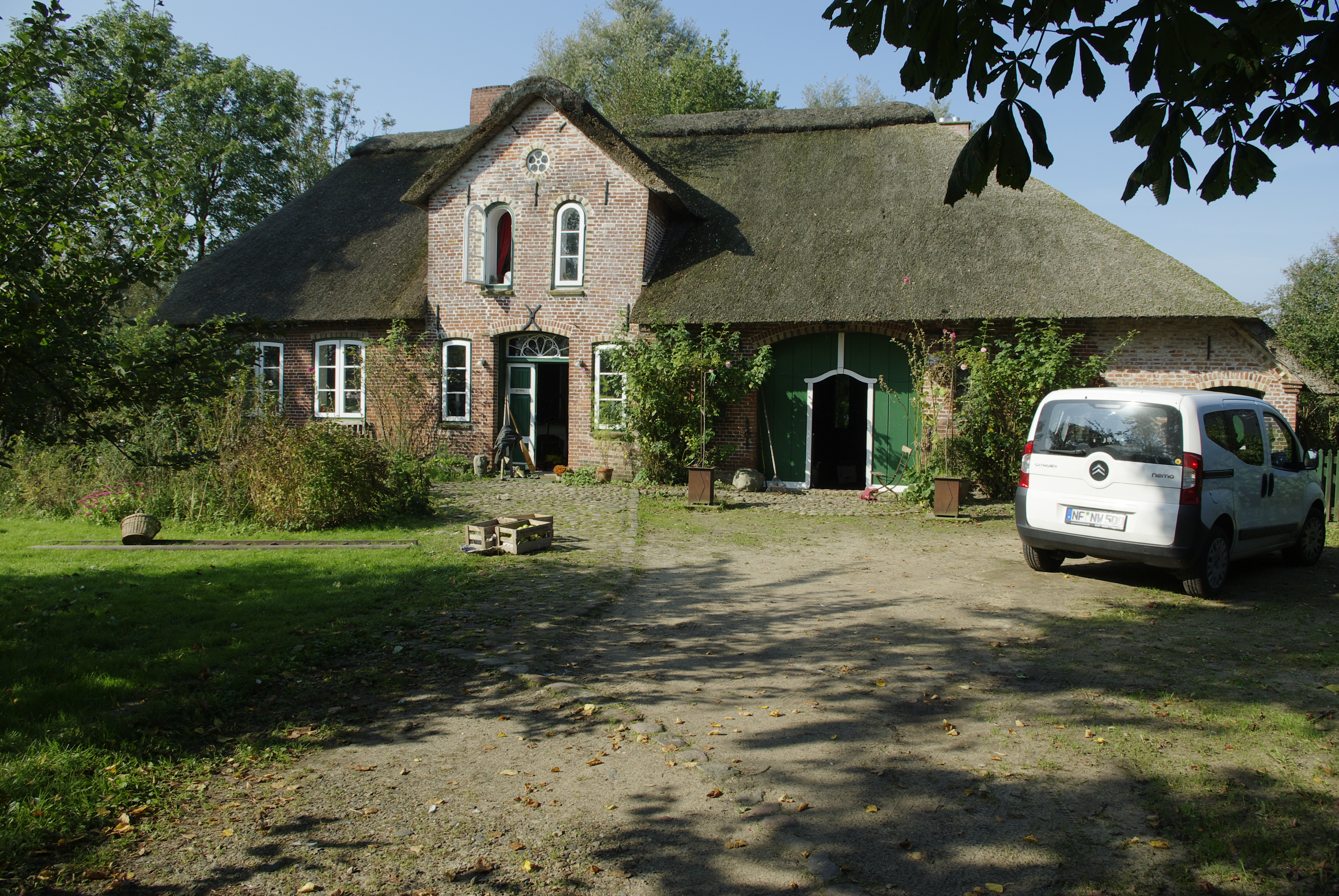 Kulturdenkmale in Drage Nummer 2